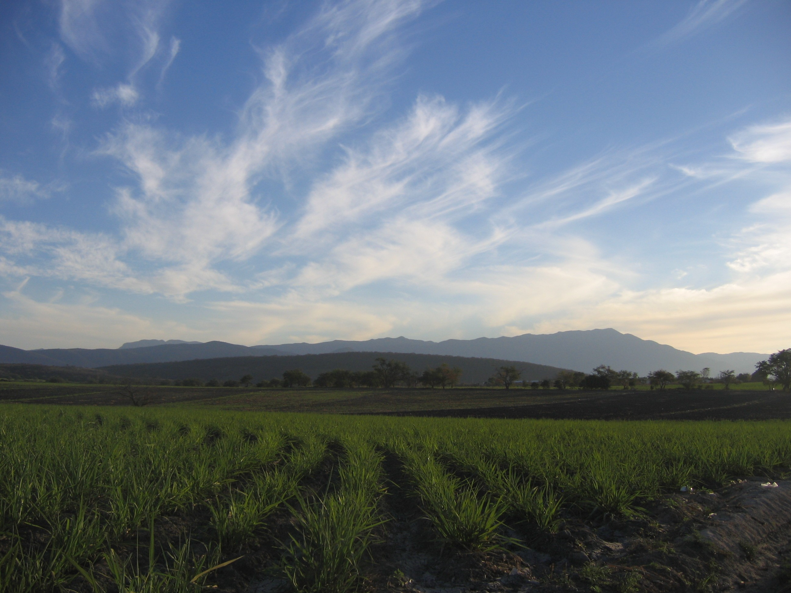 Una vista de los sembradíos que rodean al pueblo de Tlatenchi Morelos.